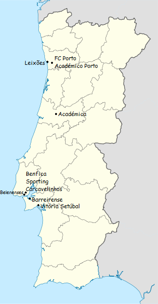 carte des clubs participants du championnat du portugal de football de première division 1939-1940